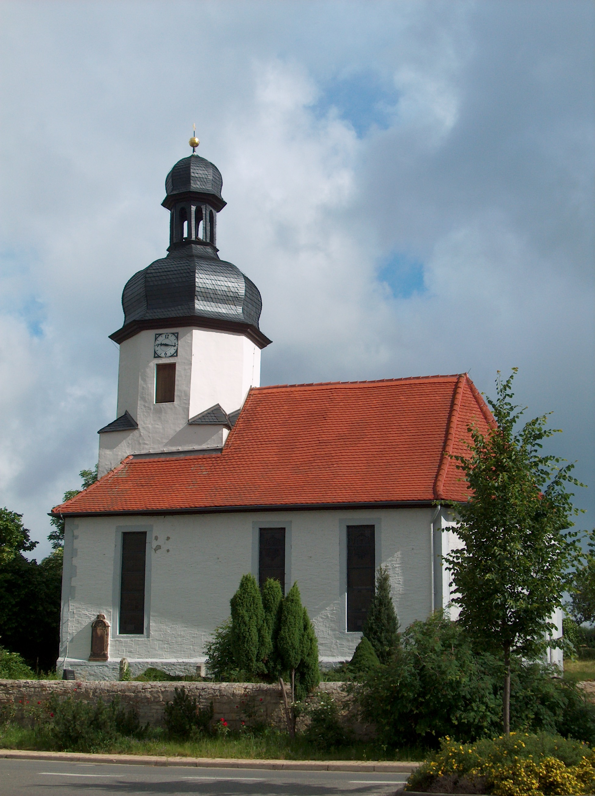 Kirche zu Heiligenkreuz